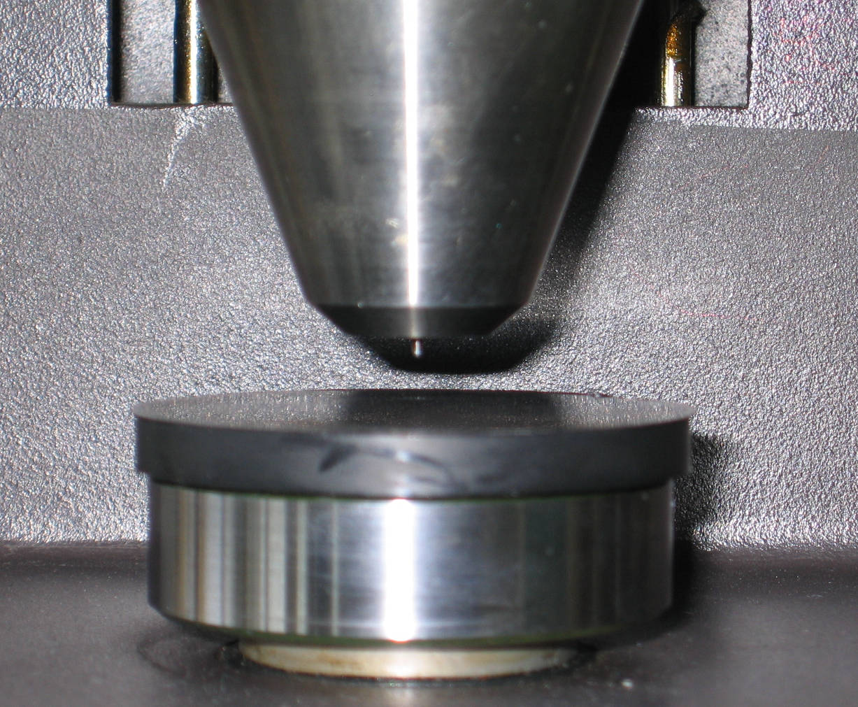 Prüfplatte während der Härtemessung